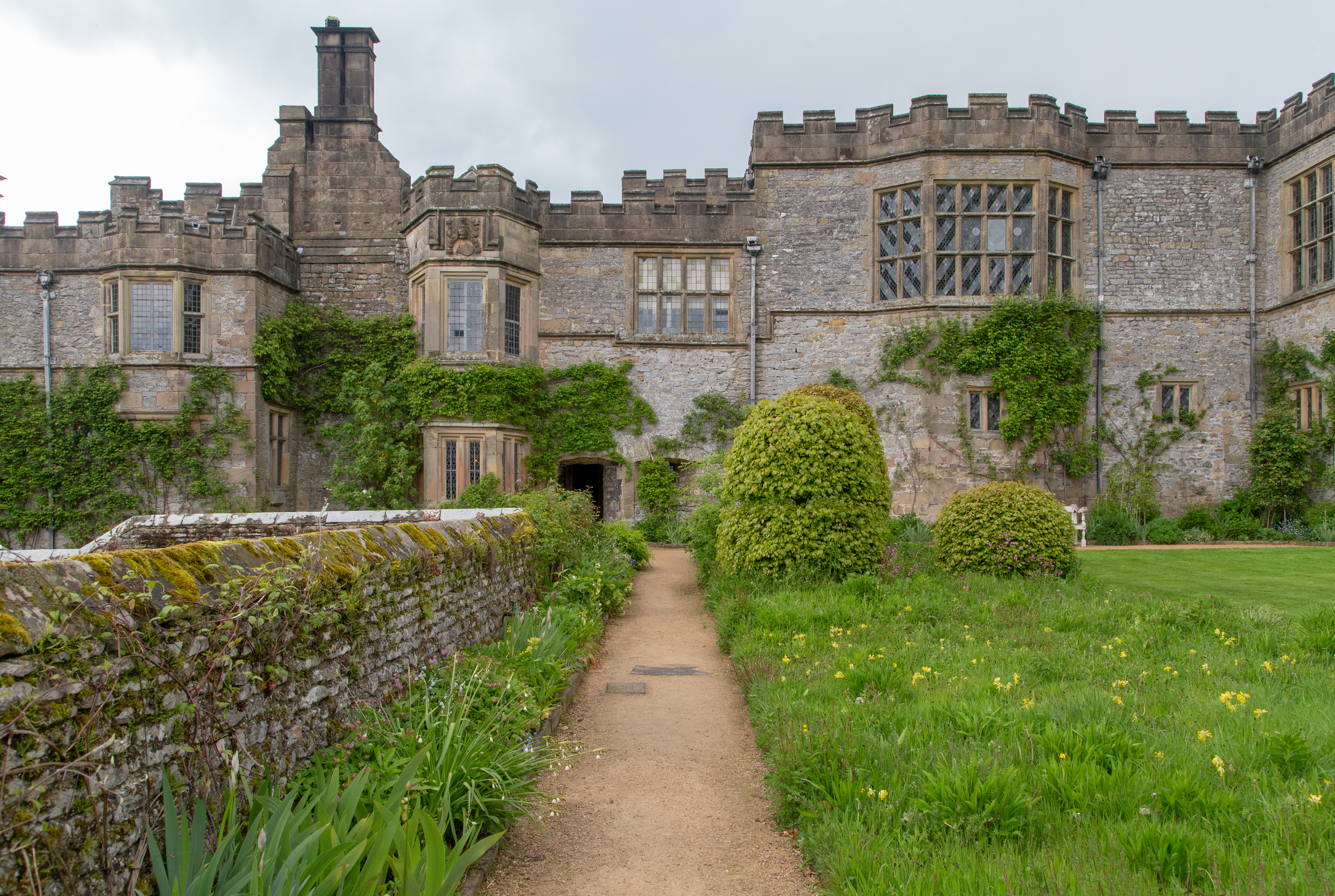 Haddon Hall